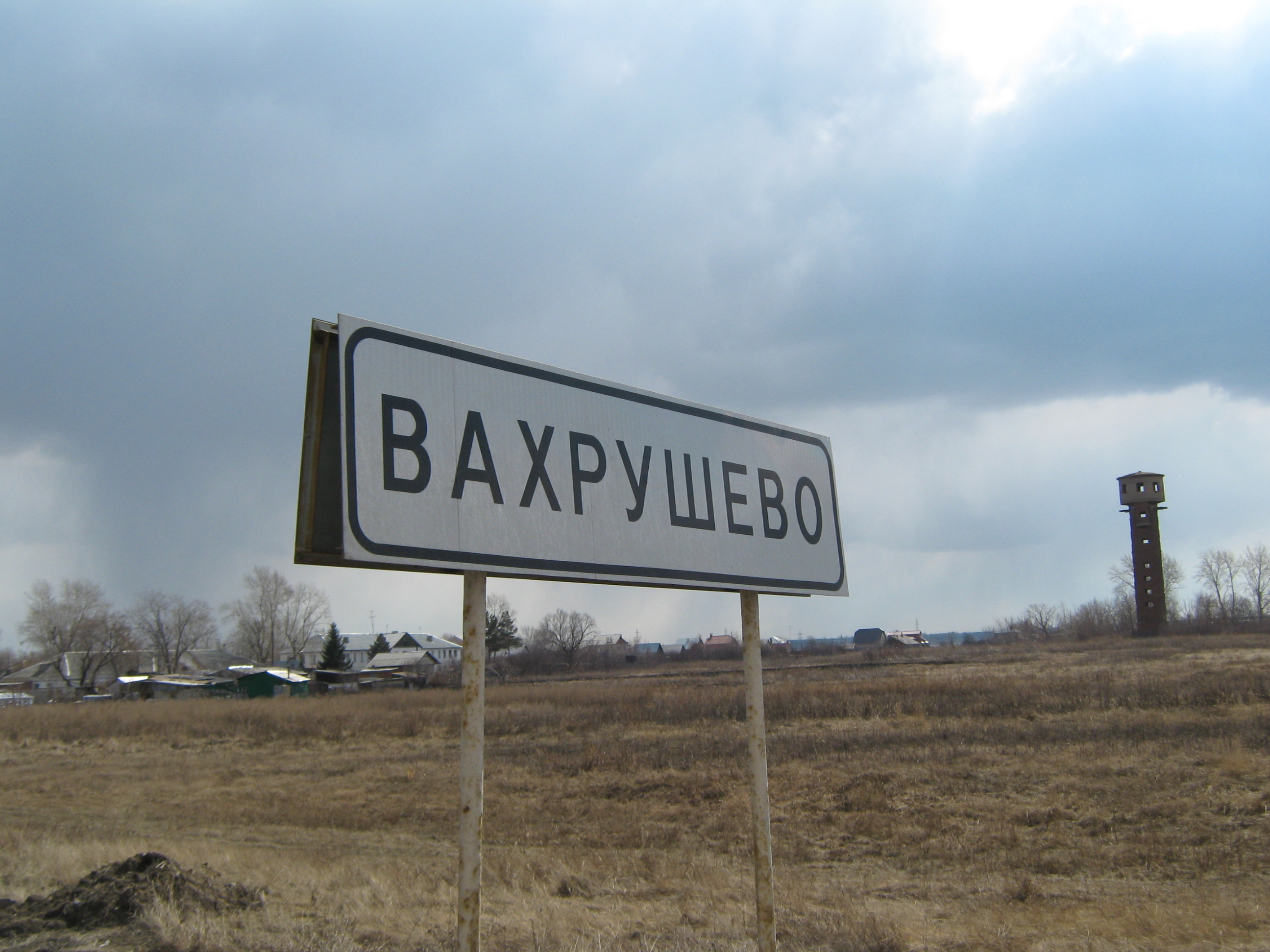 посёлок Вахрушево, Челябинская область